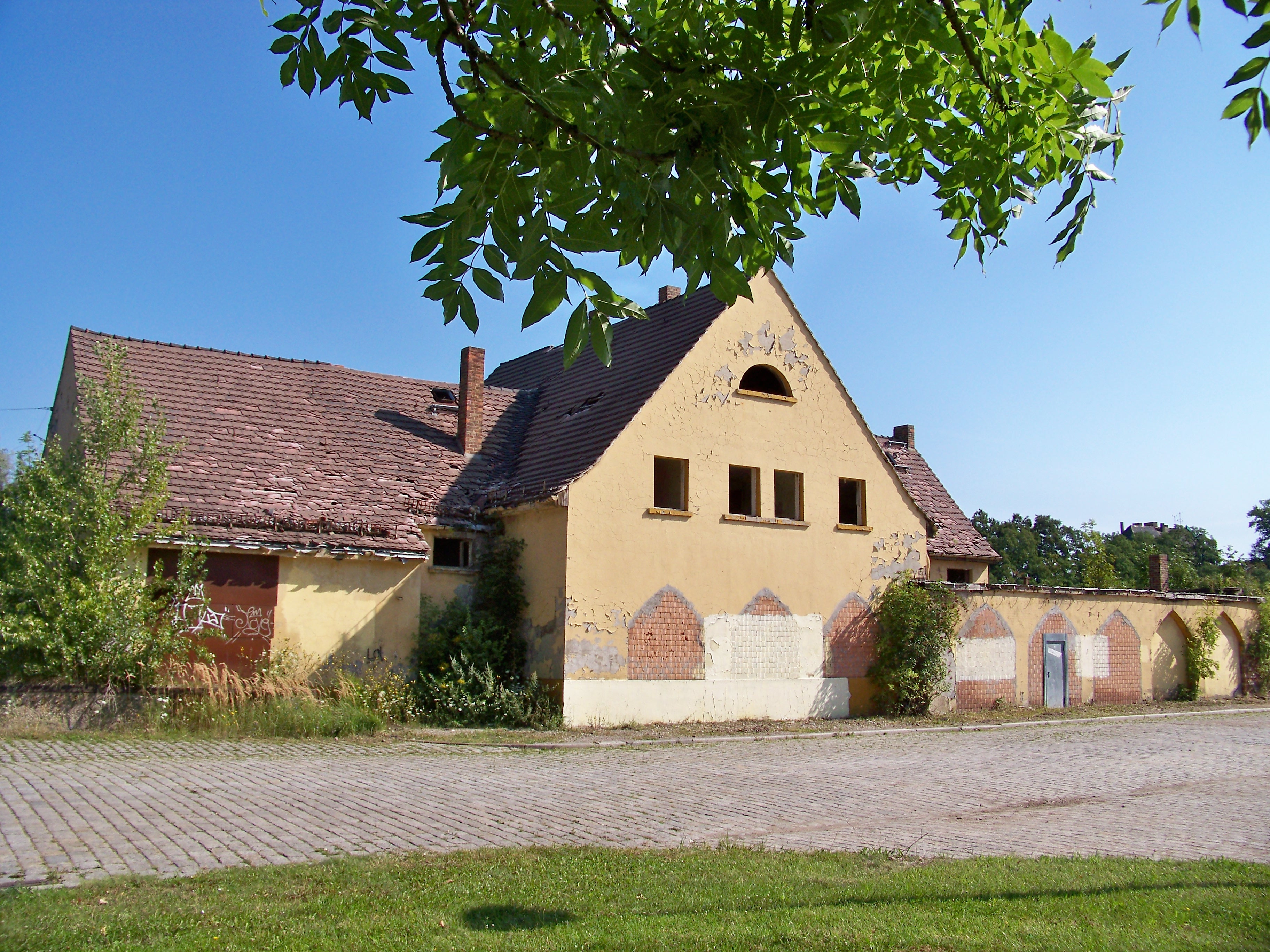 Empfangsgebäude des stillgelegten Bahnhofs Leuna